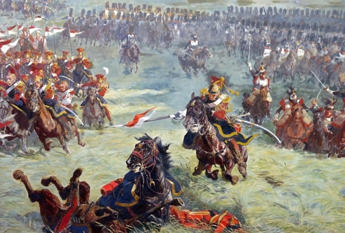 Charge des lanciers rouges de la Garde impériale à Waterloo contre les carrés britanniques situés sur le Mont-Saint-Jean. A gauche, on distingue le général Pierre-David de Colbert-Chabanais, colonel du régiment, le bras en écharpe.